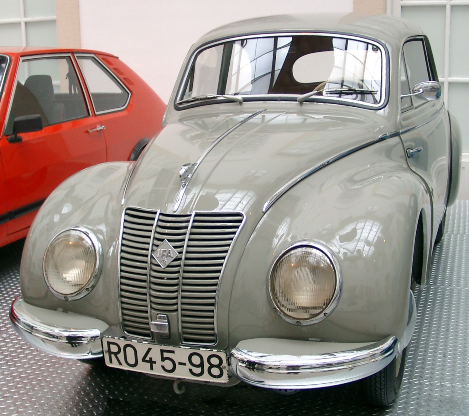 IFA F9, Typ 309/1. Fotografiert im Verkehrsmuseum Dresden